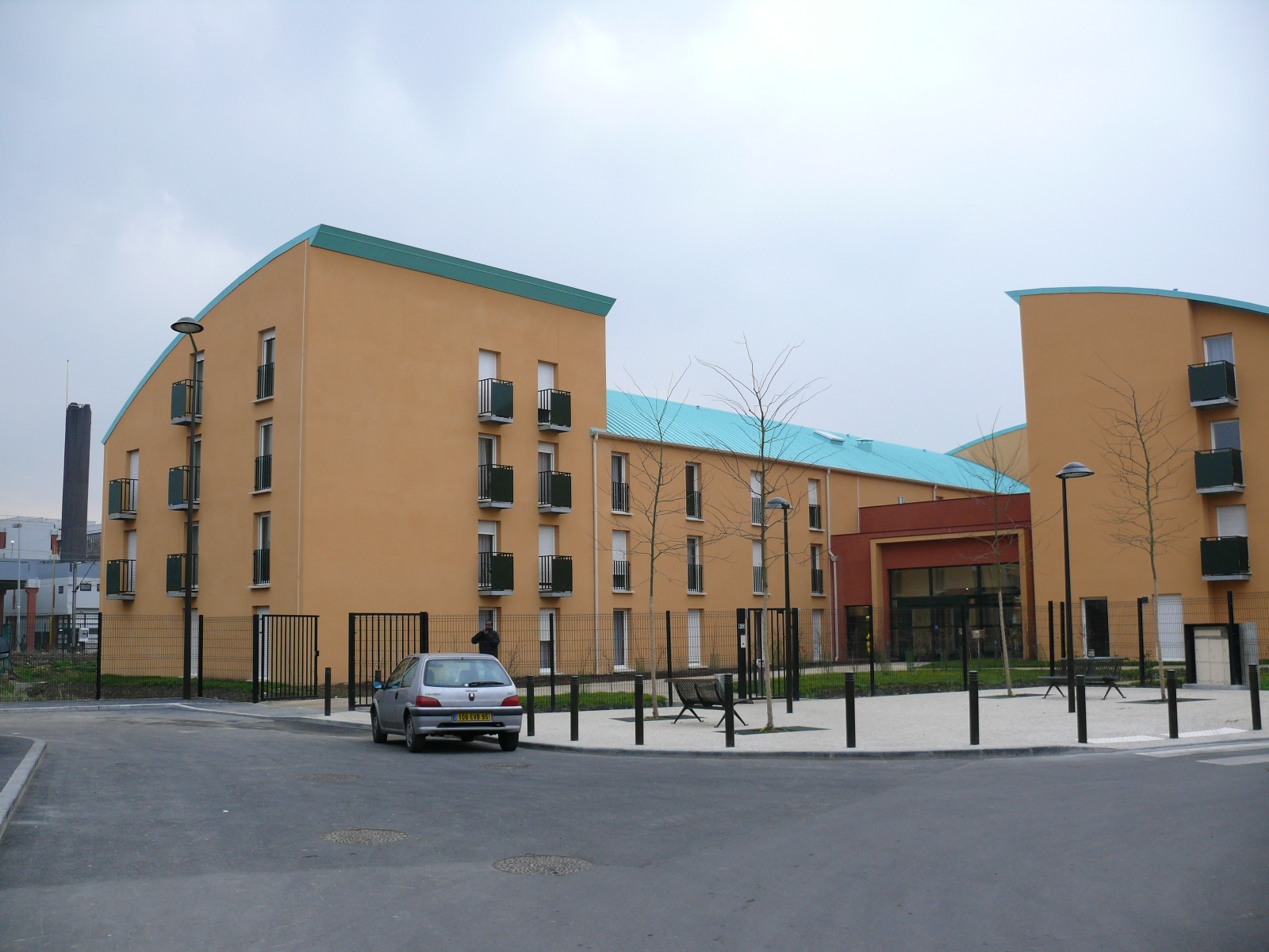 Résidence André Desilles, 21 rue Margueritte Yourcenar - Villetaneuse, conçue par M. Borel-Casanova, architecte, livrée en septembre 2006 145 chambres pour étudiants